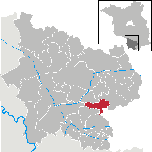 Gorden-Staupitz in Brandenburg (Country) - District Elbe-Elster